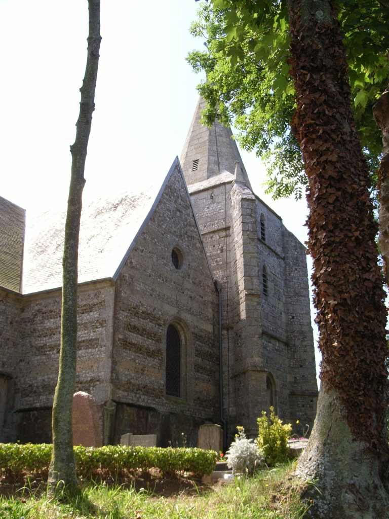 Èglise Saint Martin de Criquebeuf-en-Caux, Normandie, Fr